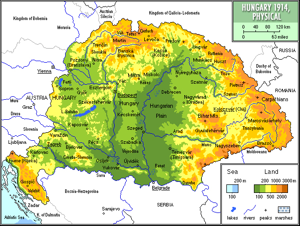 Hungary 1914, physical/Mapa fizyczna Węgier 1914